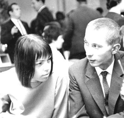 Berlin, Literaturfestival, Sarah und Rainer Kirsch